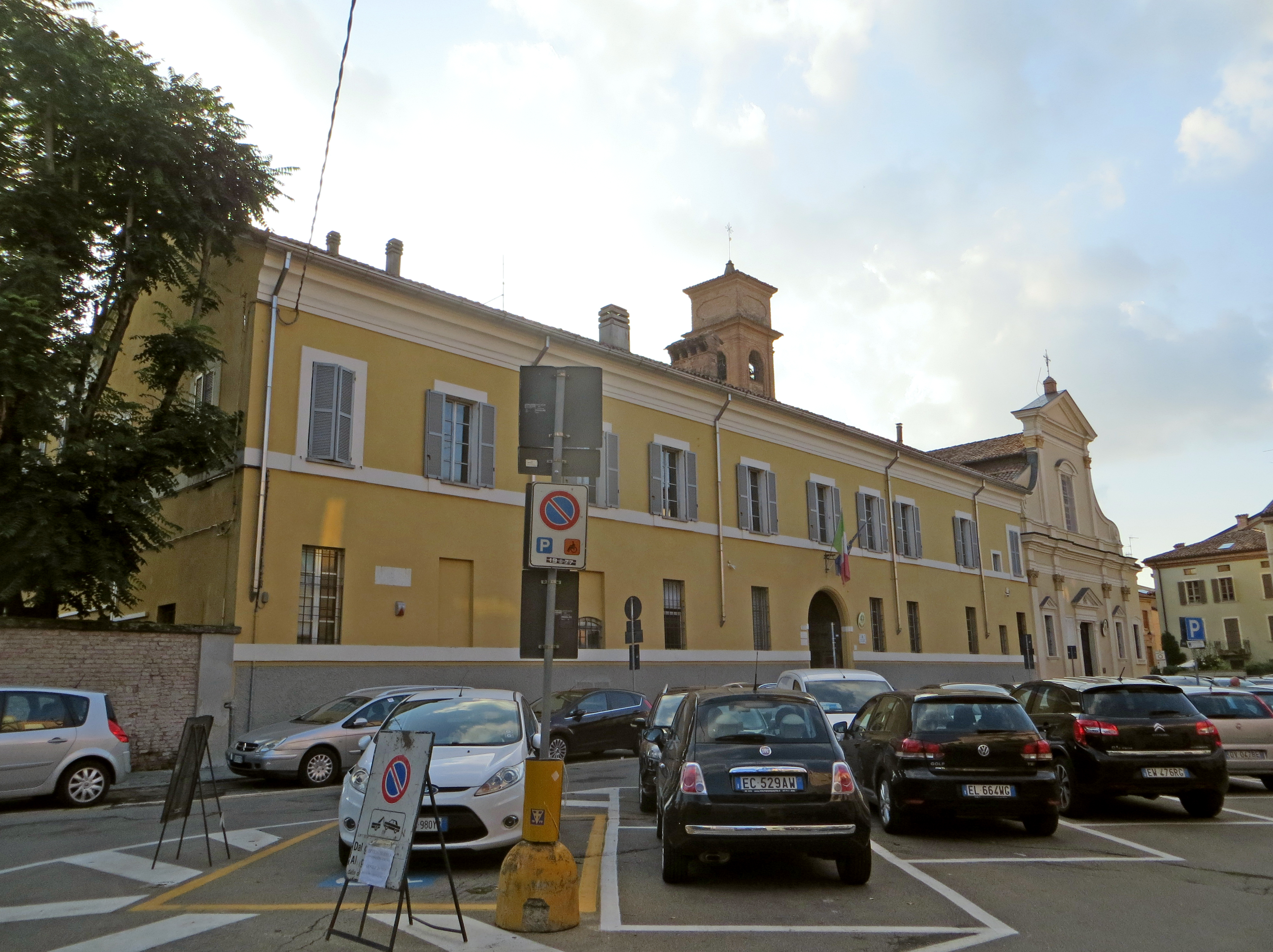 Chiesa di San Pietro (Fidenza) - convento e facciata